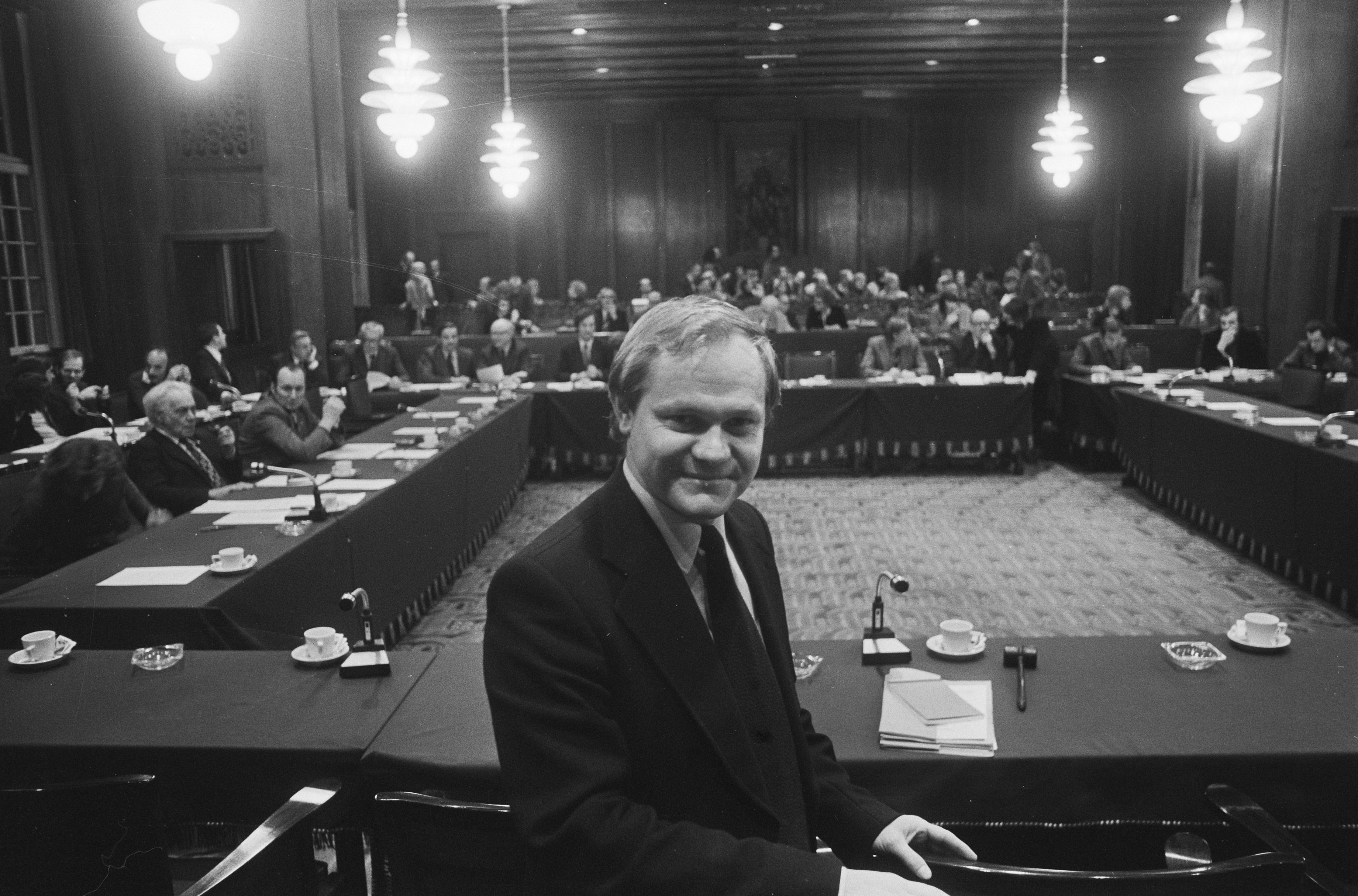 Collectie / Archief : Fotocollectie Anefo Reportage / Serie : [ onbekend ] Beschrijving : Hoorzitting koopavond in Amsterdam stadhuis; wethouder De Cloe (voorzitter hoorzitting) en vertegenwoordiger van het bedrijfsleven Datum : 28 januari 1975 Locatie : Amsterdam, Noord-Holland Trefwoorden : hoorzittingen Persoonsnaam : Cloe, Dirk W. de Fotograaf : Peters, Hans / Anefo Auteursrechthebbende : Nationaal Archief Materiaalsoort : Negatief (zwart/wit) Nummer archiefinventaris : bekijk toegang 2.24.01.05 Bestanddeelnummer : 927-7192